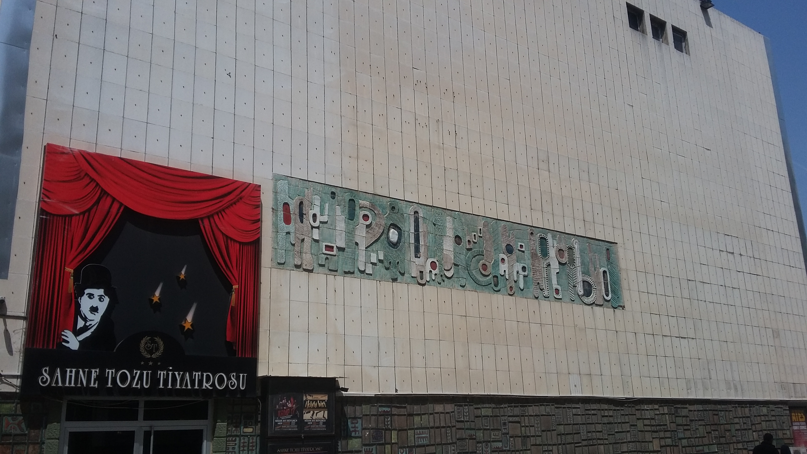 Sahne Tozu Tiyatrosu girişi.